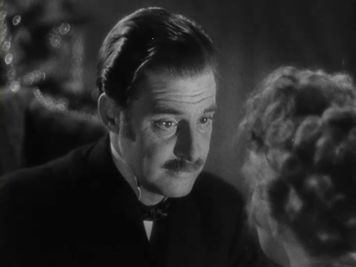 1939年製作の映画『チップス先生さようなら』の予告編動画より。1890年代、中年期のチップス先生を演じるロバート・ドーナットと彼の妻キャサリンを演じるグリア・ガースン